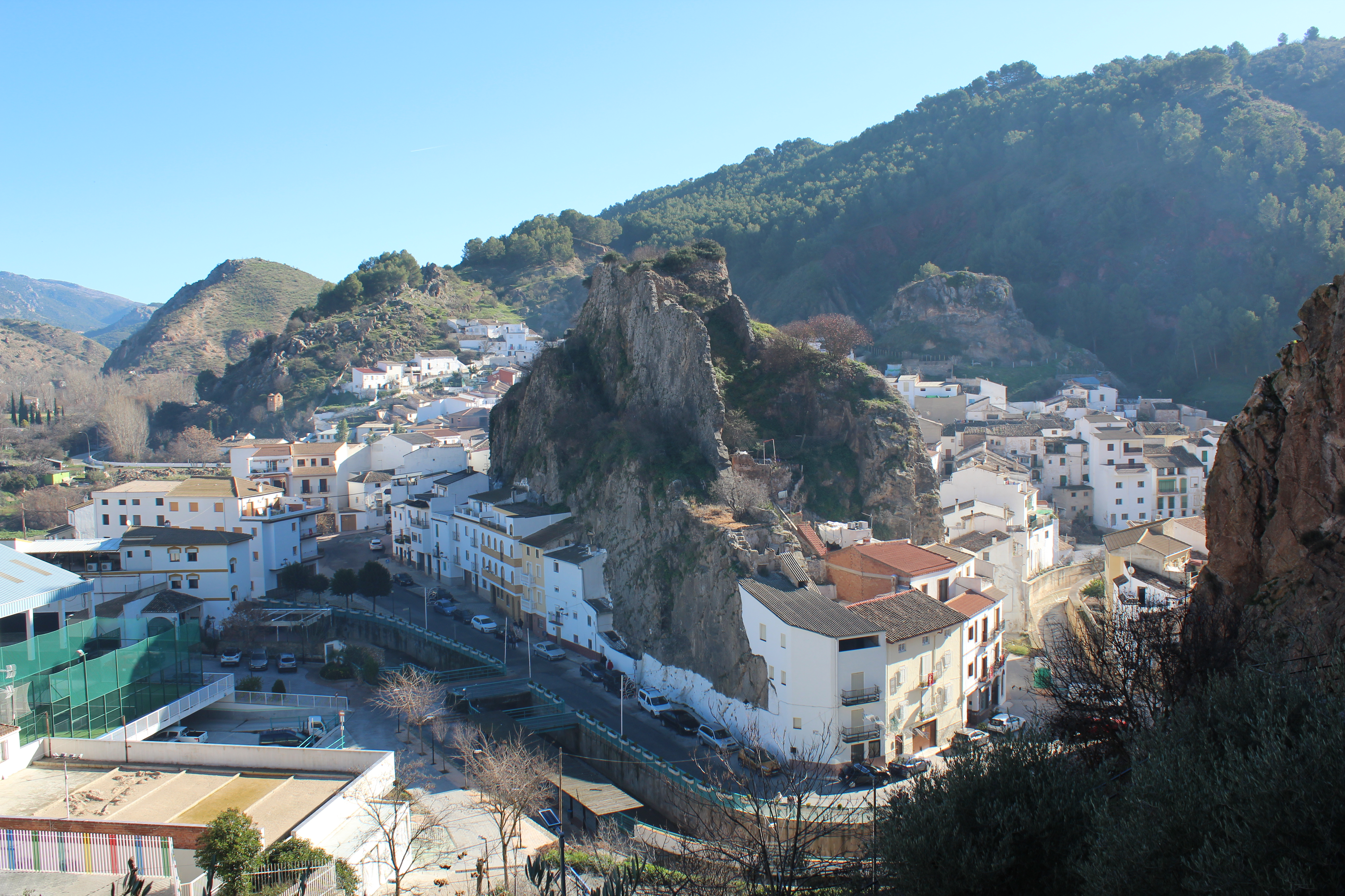 Panorámica de Cambil y del Castillo de Alhabar.